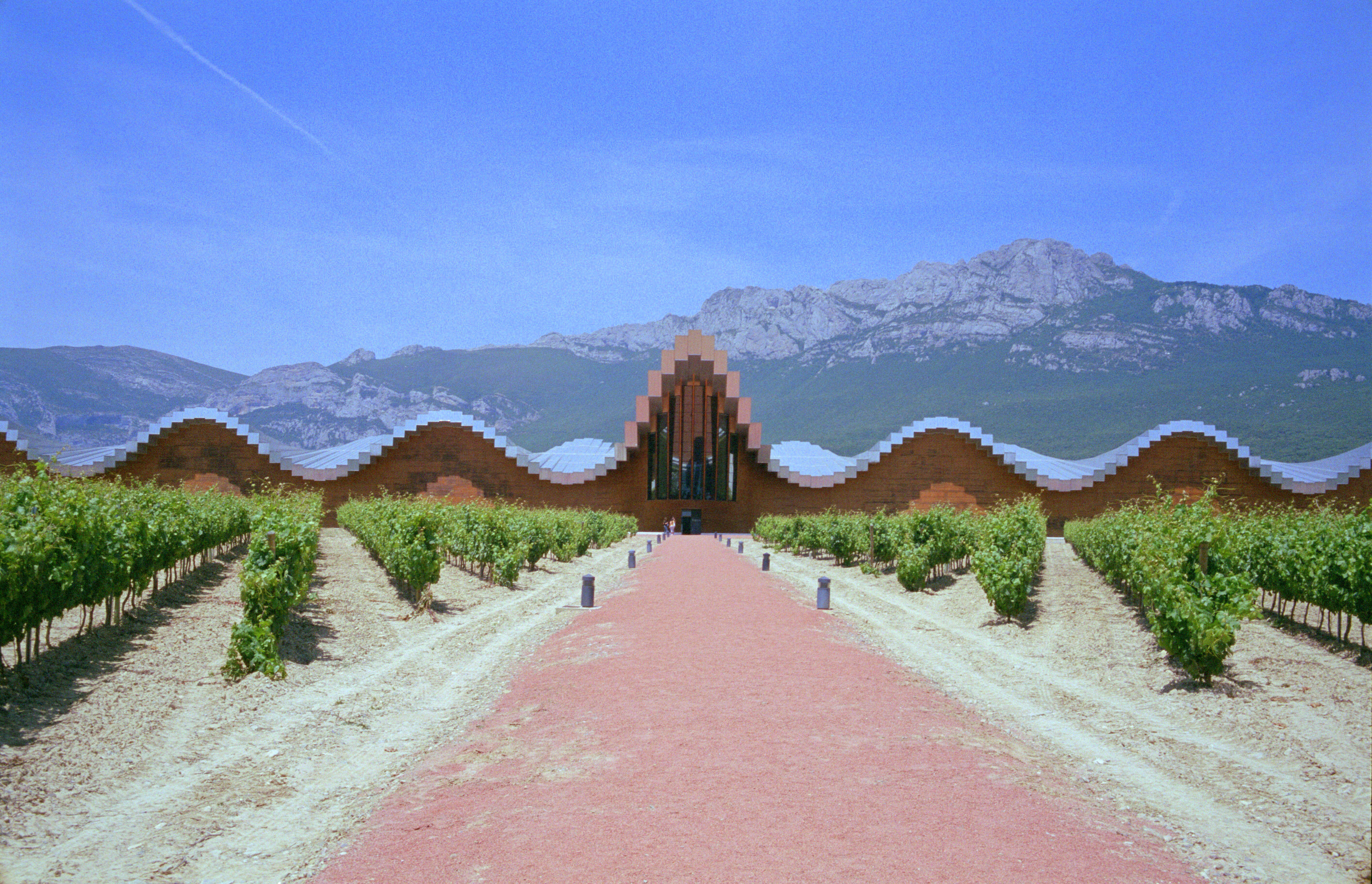 Vignoble des caves Ysios Rioja